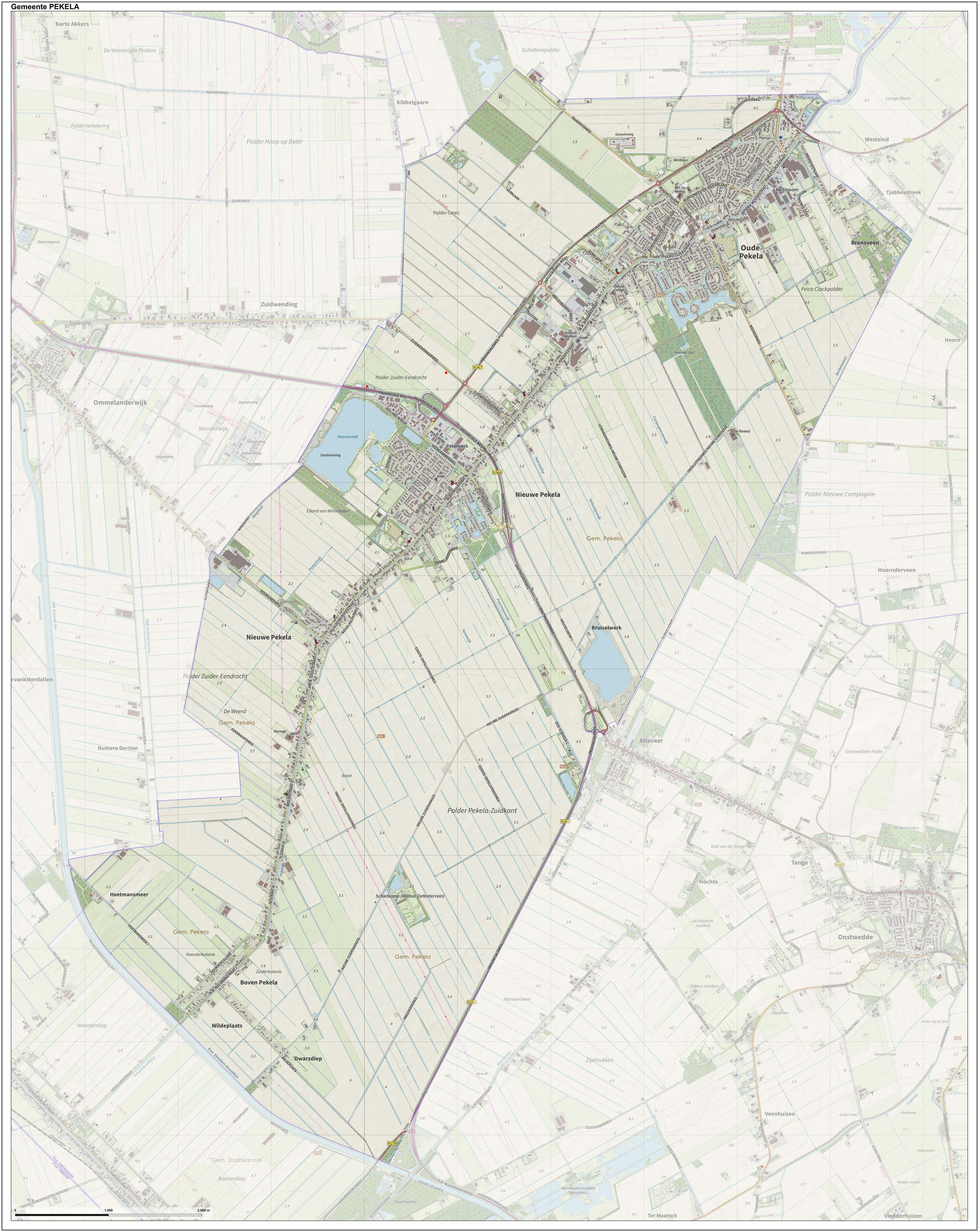 Topografische gemeentekaart. Resolutie: 300 pixels/km. Kaartbeeld samengesteld uit de open geodata van de Top10NL en Top25namen (Kadaster), Creative Commons-BY licentie. Gebouwvlakken uit open geodata BAG extract. Wegen uit de OpenStreetMap, OpenStreetMap community. Reliëfschaduw uit de Actuele Hoogtekaart AHN2. Samenstelling en kleurenschema: Jan-Willem van Aalst, met QGIS. Zie ook de Legenda.